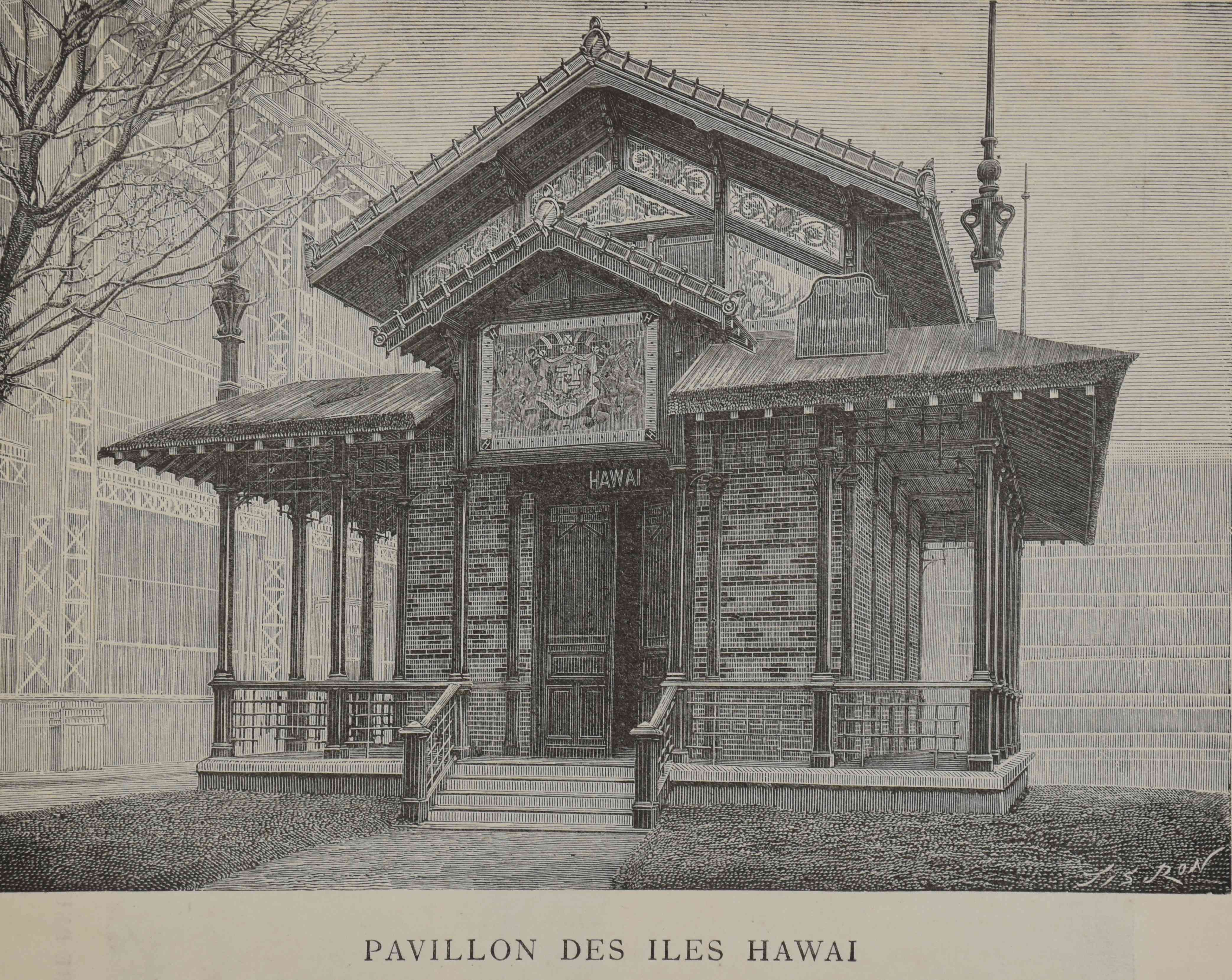 Le Pavillon des Îles Hawaï au Champ de Mars à Paris en 1889. Tiré du "Livre d'or de l'exposition de 1889", page 279, Edité par L. Boulanger, Paris (1889